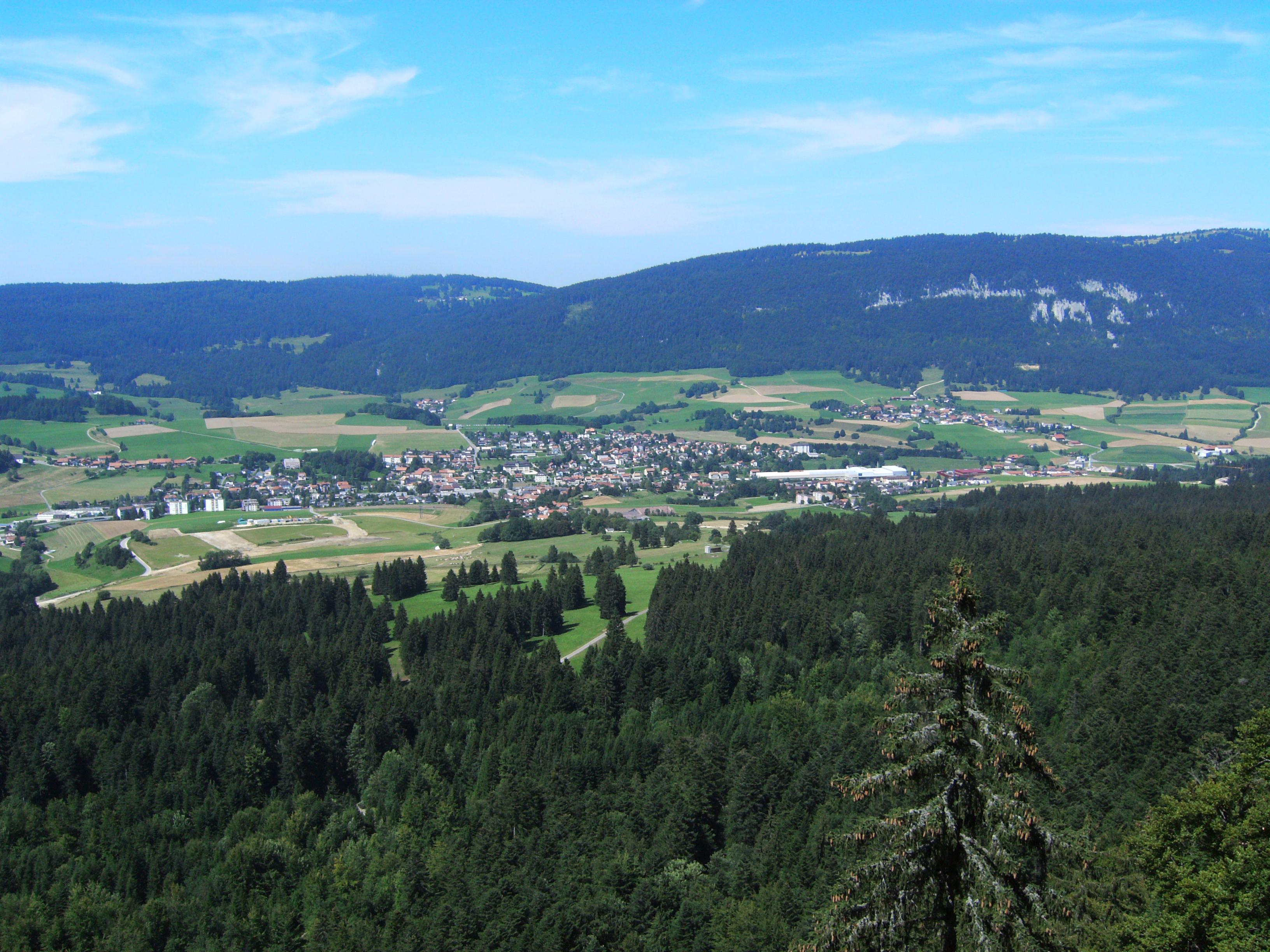 Vue de la commune de Reconvilier (canton de Berne, Suisse). Prise de la photo depuis la montagne de Montoz, point de vue du Fülliloch.